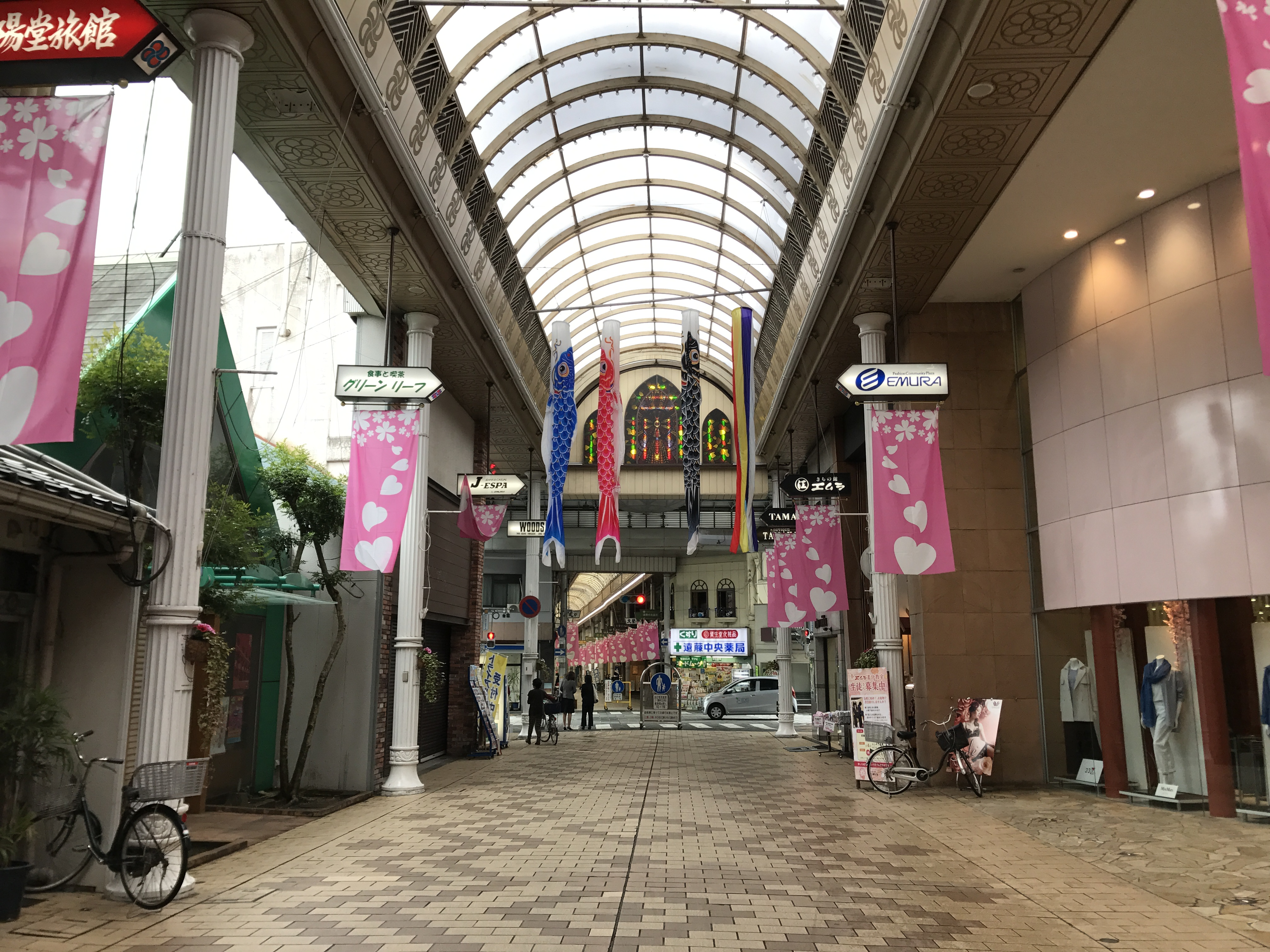 米屋町商店街